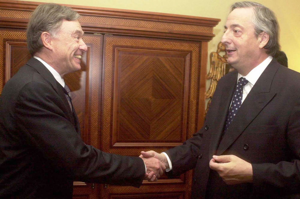 México - El presidente Néstor Kirchner se reunió con el director general del F.M.I., Horst Köhler.